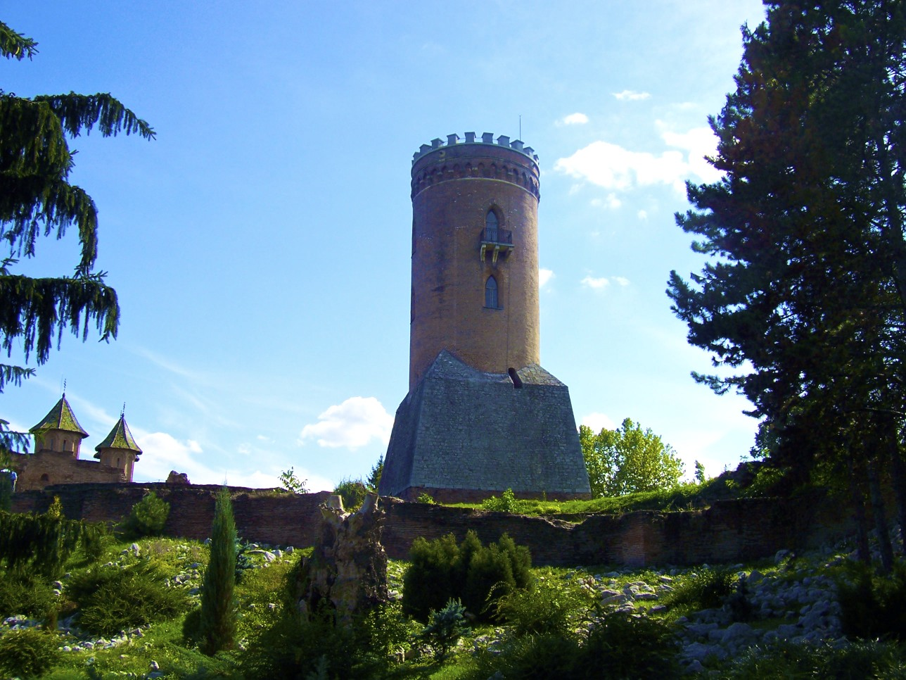 la torre de la ciudad 03